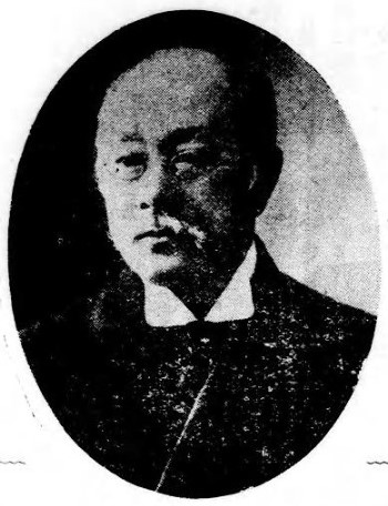 島津忠亮伯爵（1849～1909）